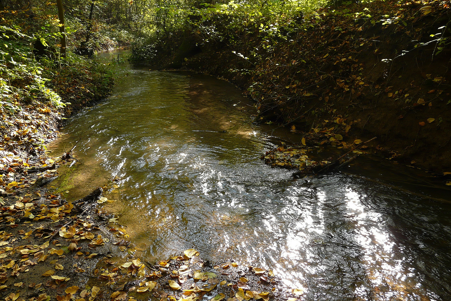 Strenický potok u obory Podčejk